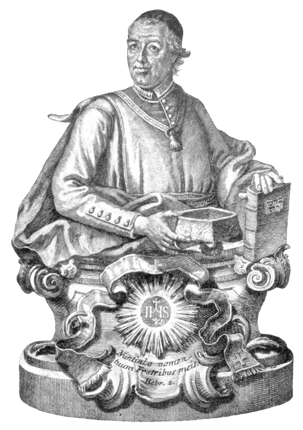 Gottfried Bernhard Göz, Franz Regis Göz: Portrait of Sebastian Sailer. Engraving, Augsburg, ca. 1760.